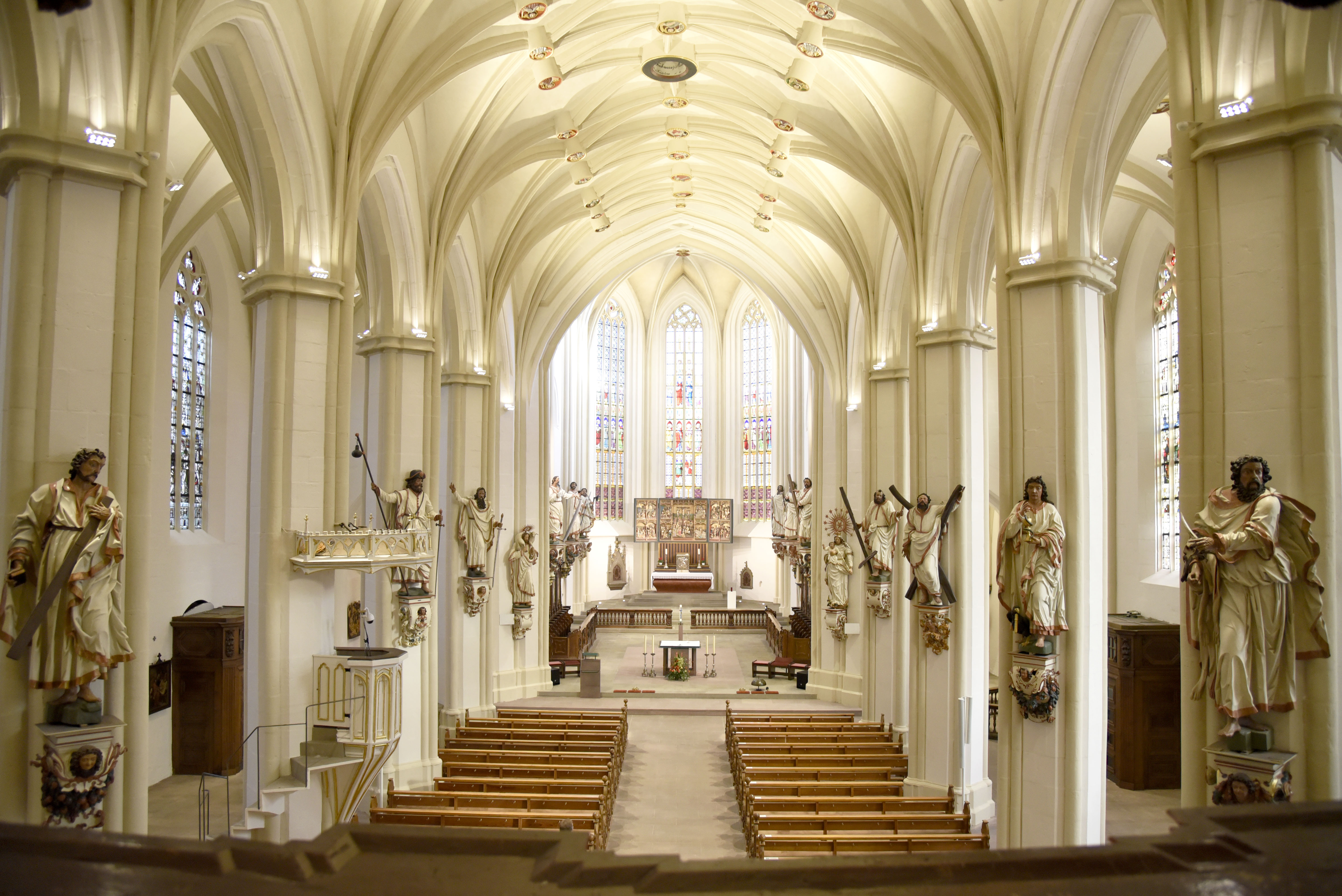 Blick auf den Hauptaltar im Hochchor nach den Renovierungsarbeiten (2016) mit folgenden Apostelfiguren: Linke Seite (von hinten in Richtung Altar) Jakobus der Jüngere Jakobus der Ältere Paulus Jesus als guter Hirte Simon Matthäus Matthias Rechte Seite (von hinten in Richtung Altar) Bartholomäus Johannes Andreas Petrus Maria Philippus Thomas Judas Thaddäus